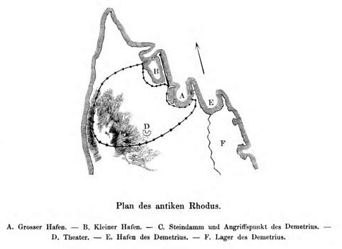 from: Albert Berg Die Insel Rhodus, aus eigener Anschauung und nach den vorhandenen Quellen historisch, geographisch, archäologisch, malerisch beschrieben und durch Originalradierungen und Holzschnitte nach eigenen Naturstudien und Zeichnungen illustrirt (1861) Plan des antiken Rhodus